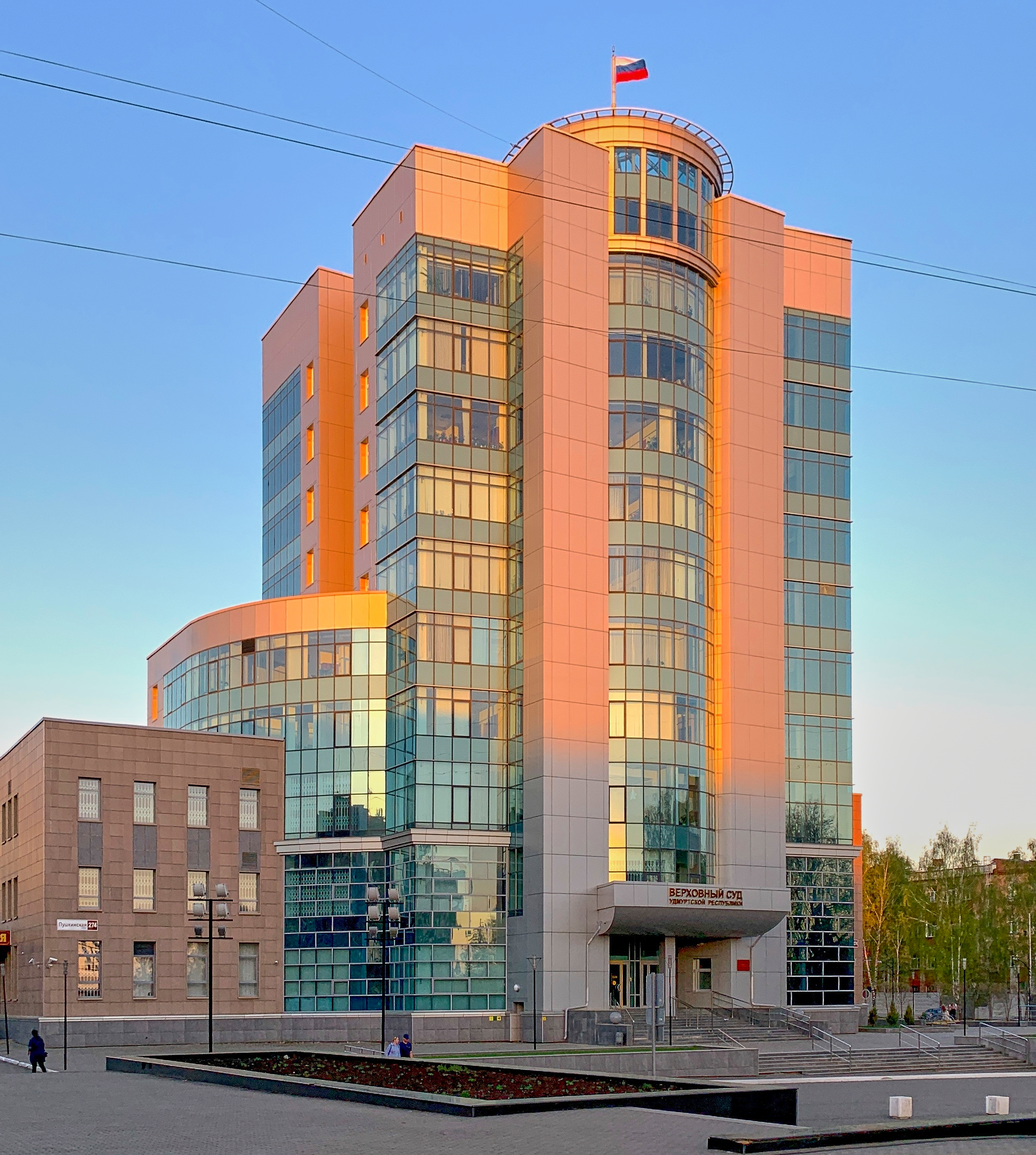 Здание Верховного суда Удмуртской республики (ул. Пушкинская, 274)